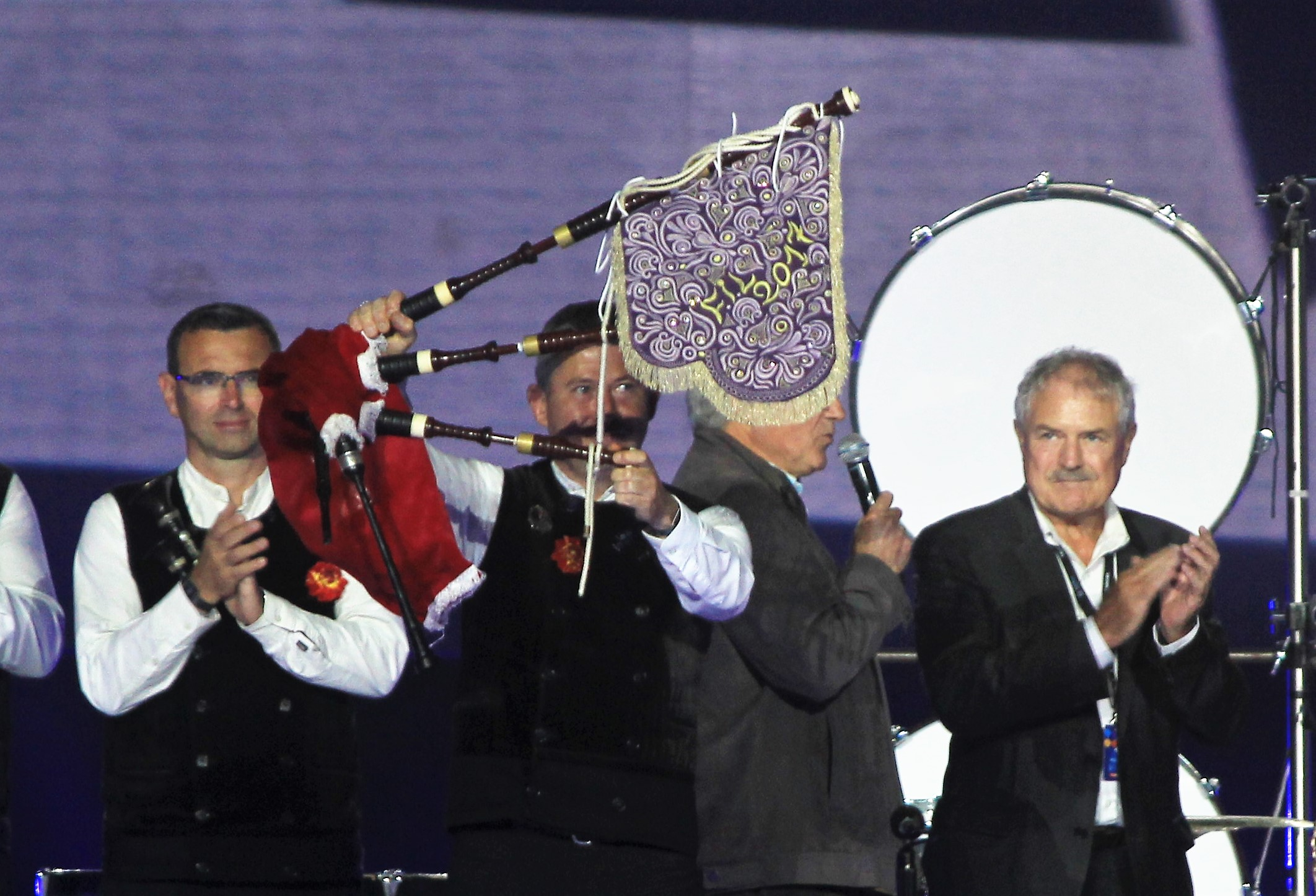 le bagad brieg, champion de l'épreuve de Lorient, recevant le fanion du festival interceltique.